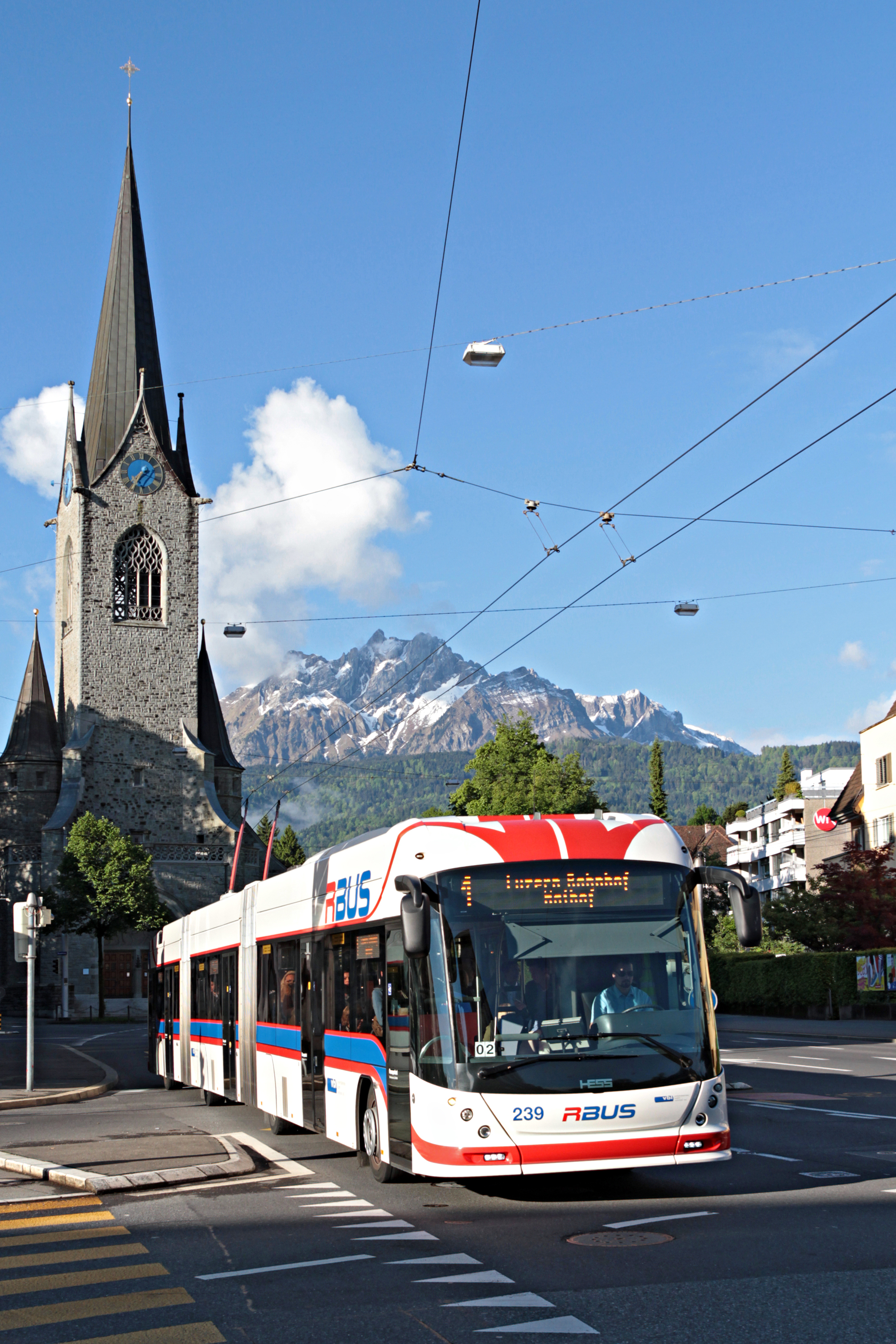 Der Hess/Vossloh-Kiepe BGGT-N2D "lighTram 4" der Verkehrsbetriebe Luzern in RBus-Lackierung vor der Pauluskirche und dem Pilatus